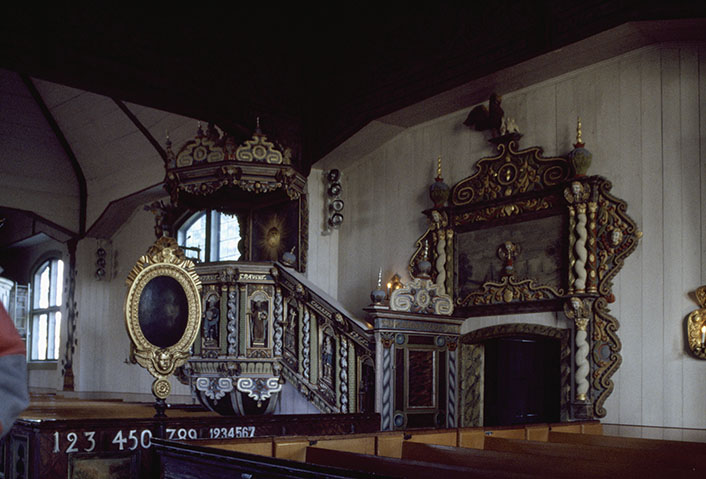 Tornion kirkon saarnatuoli ja koristellut sakastin ovet